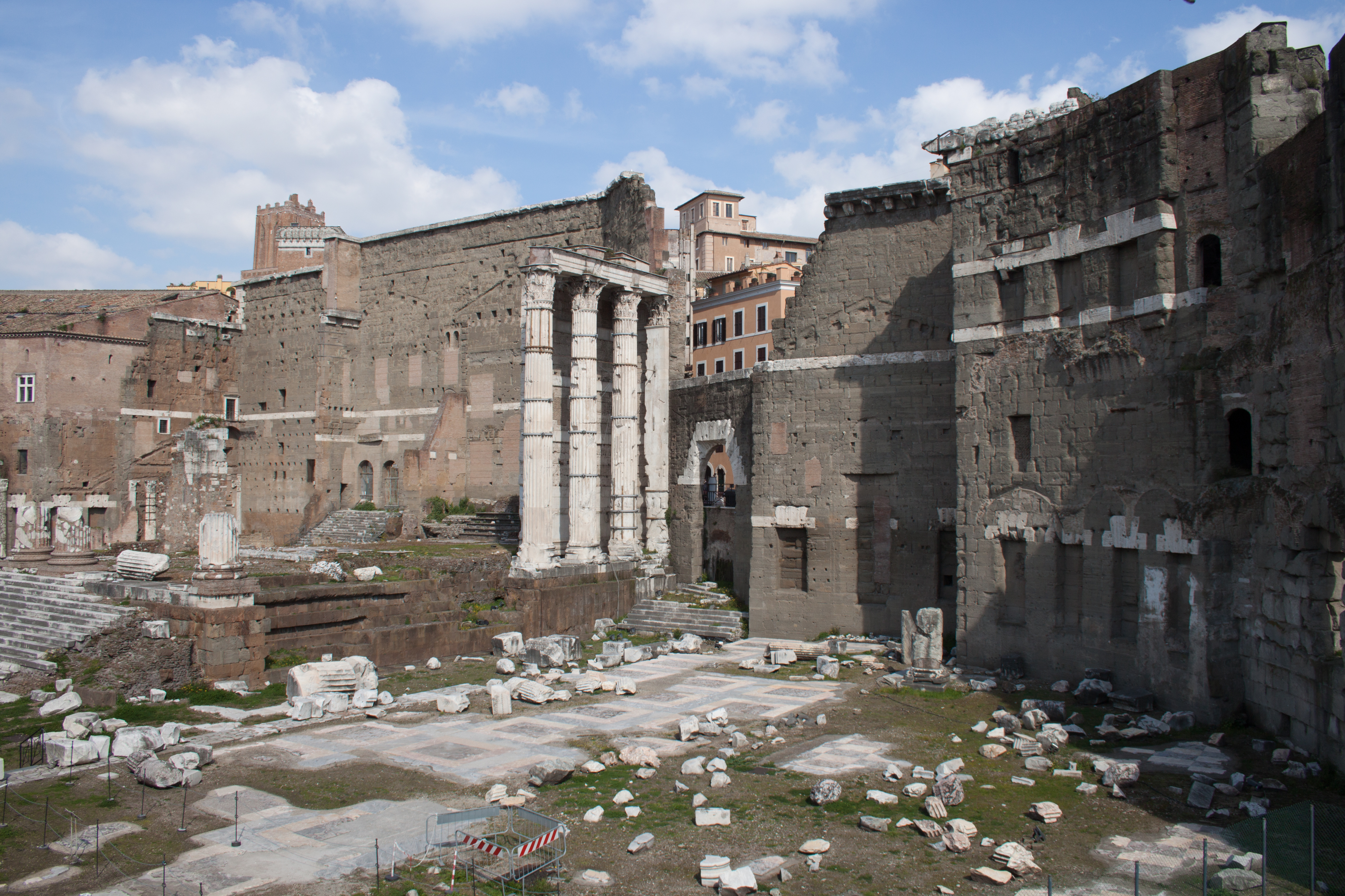 Imperial Forums in Rome